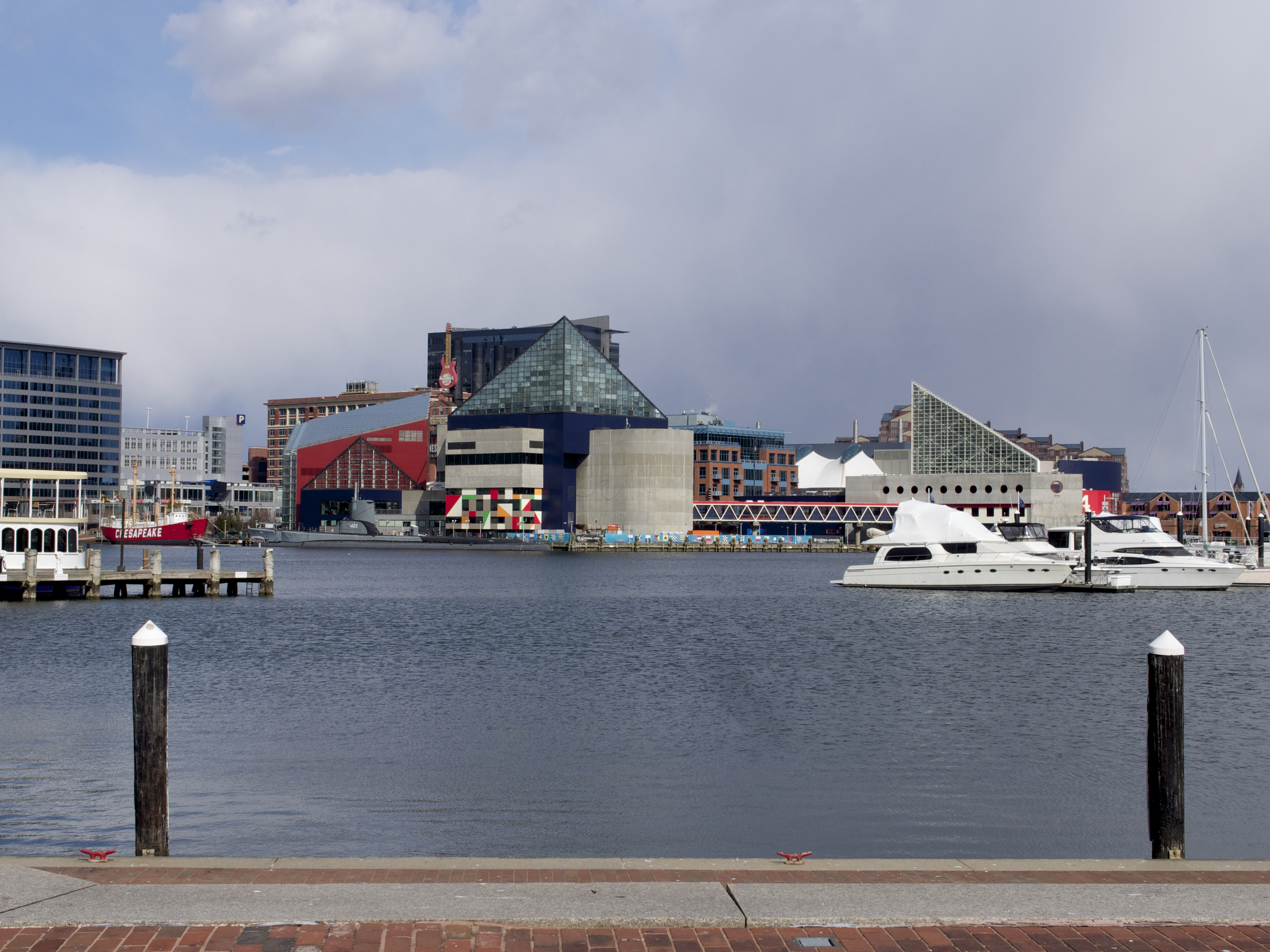 Baltimore Aquarium at Inner Harbor